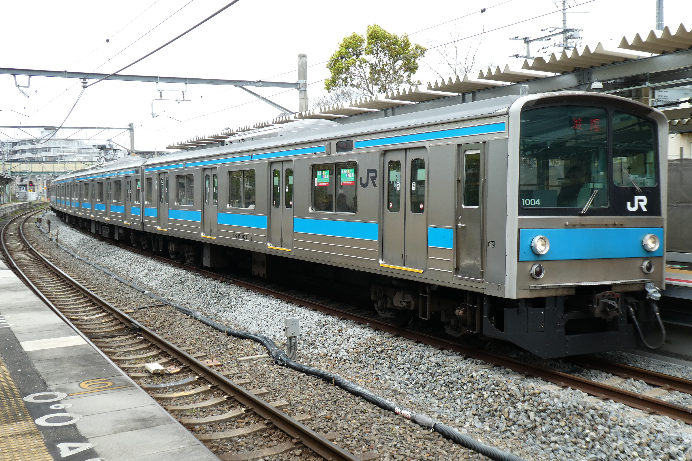 桃山駅に停車中の205系電車